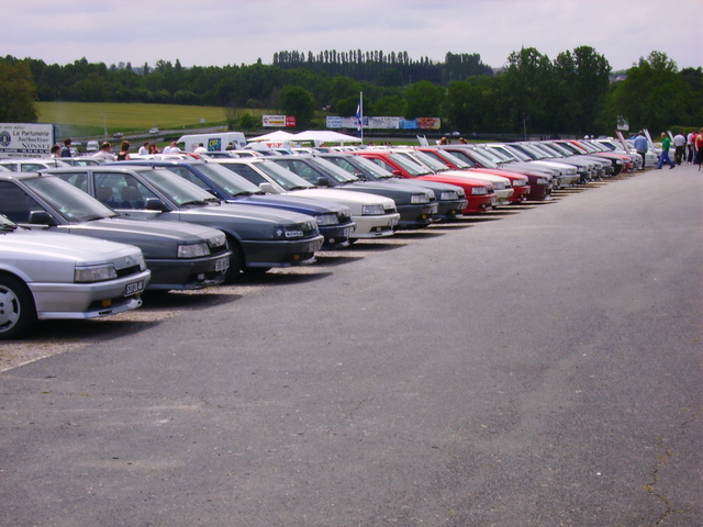 Rassemblement de Renault 21 Turbo en provenance de toute l'Europe